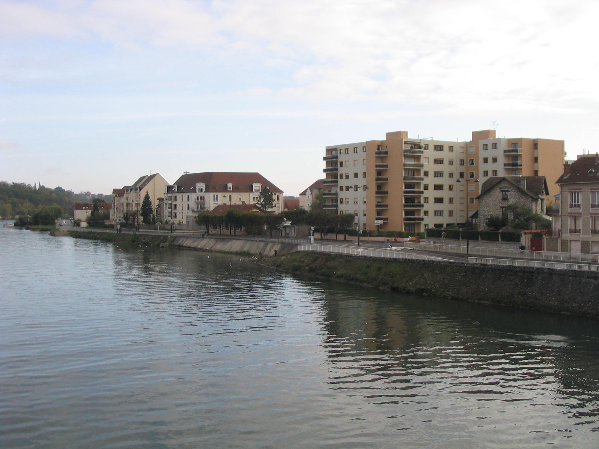 La partie du quartier Saint Ambroise jouxtant la Seine, à Melun(France).